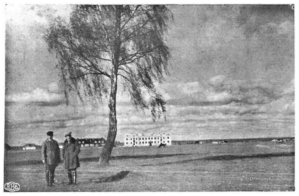 Беларуская (тарашкевіца): Маладэчна (Maładečna), Гелянова (Helanova)